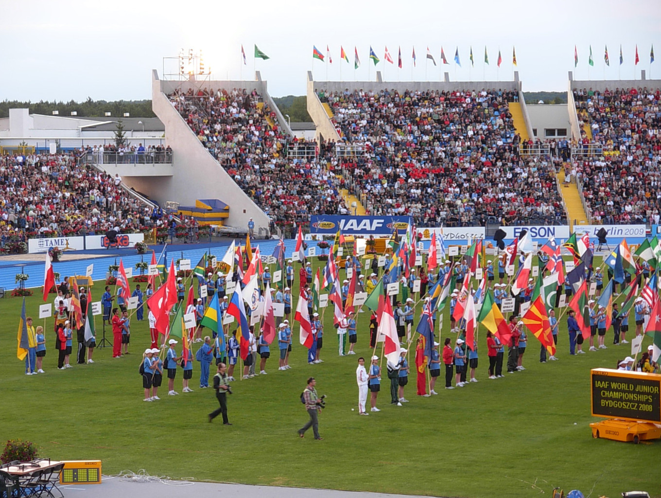 Mistrzostwa Świata Juniorów w Lekkiej Atletyce Bydgoszcz 2008 - ceremonia otwarcia